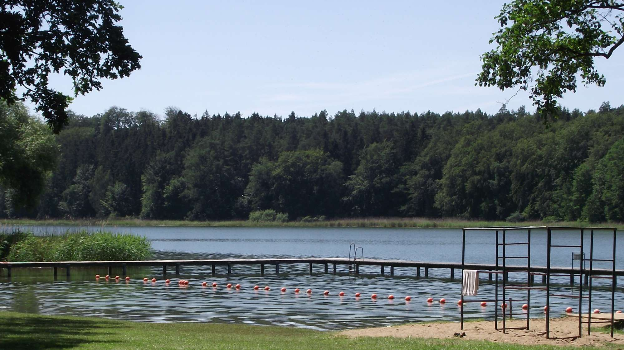 Passower See, Badestelle